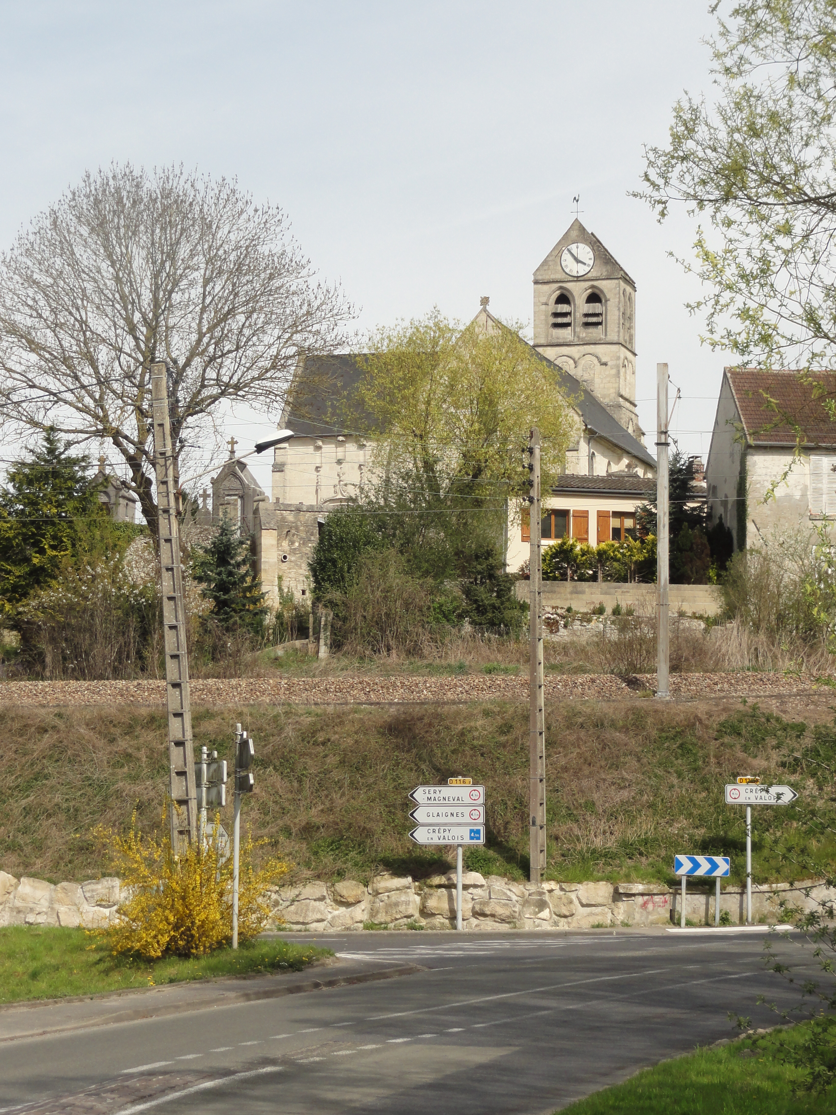 Église Saint-Pierre de Duvy (voir titre).